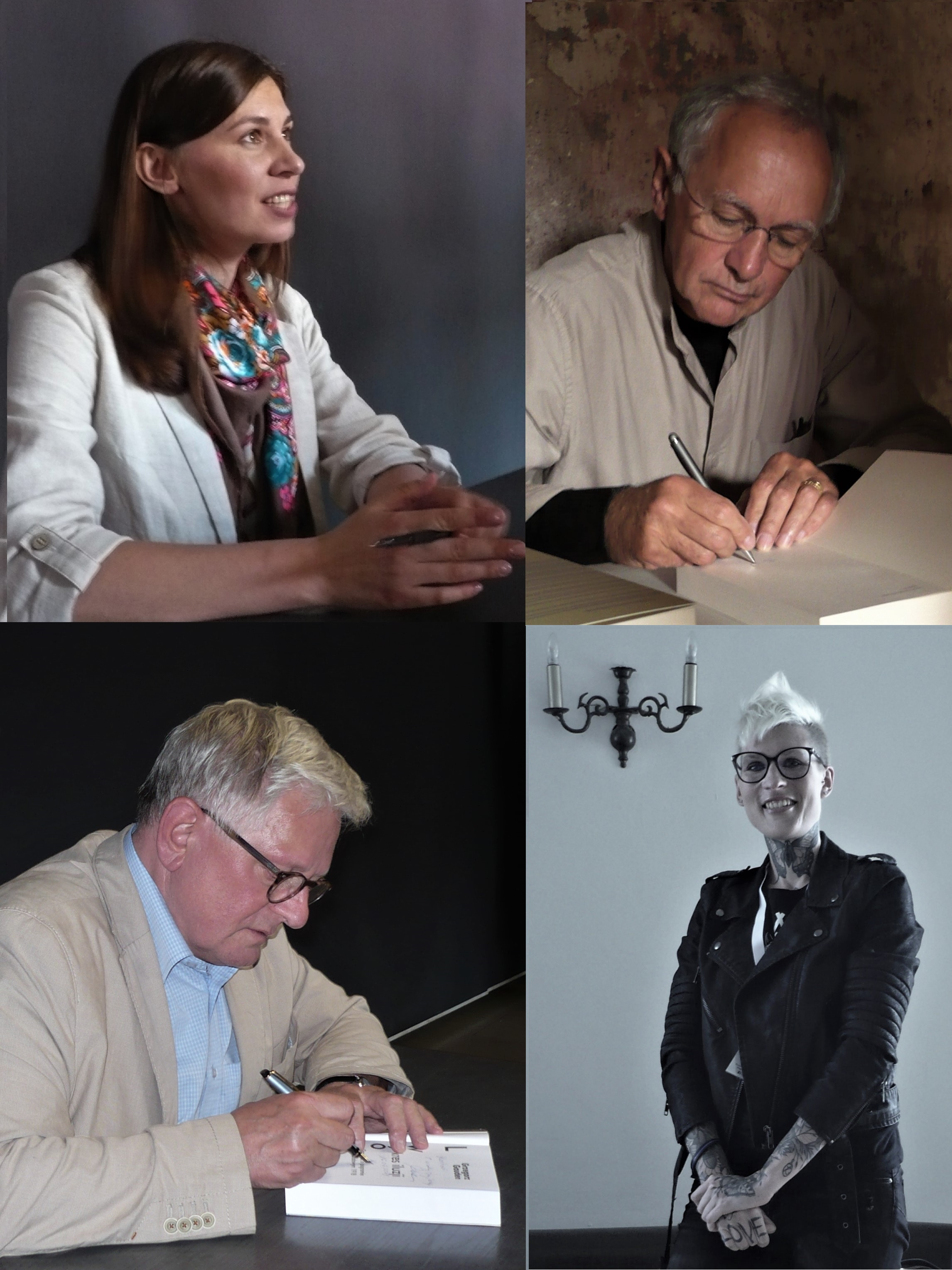 Tania Malarczuk (lg), Grzegorz Gauden (ld), Maciej Zaremba (pg), Katarzyna Puzyńska (pd)